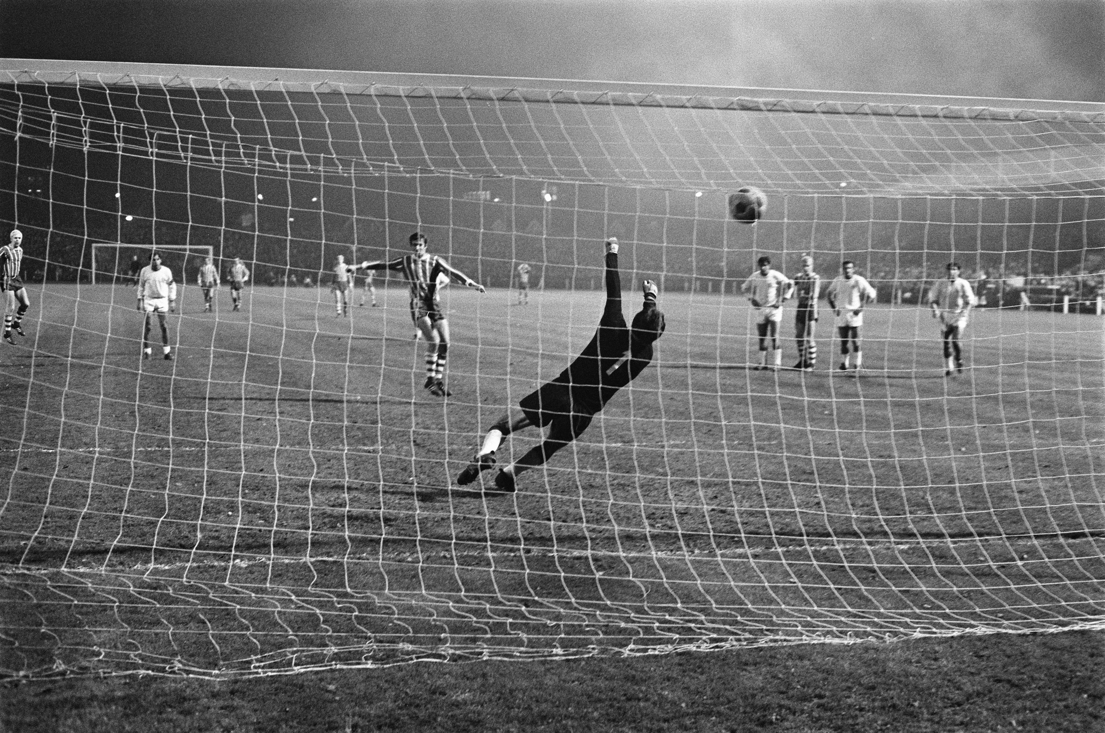 PSV tgen AS Roma 1-0 in de Europa Cup II . Van der Kuylen scoort uit een penalty, keeper Ginulfi duikt tevergeefs Datum 26 november 1969